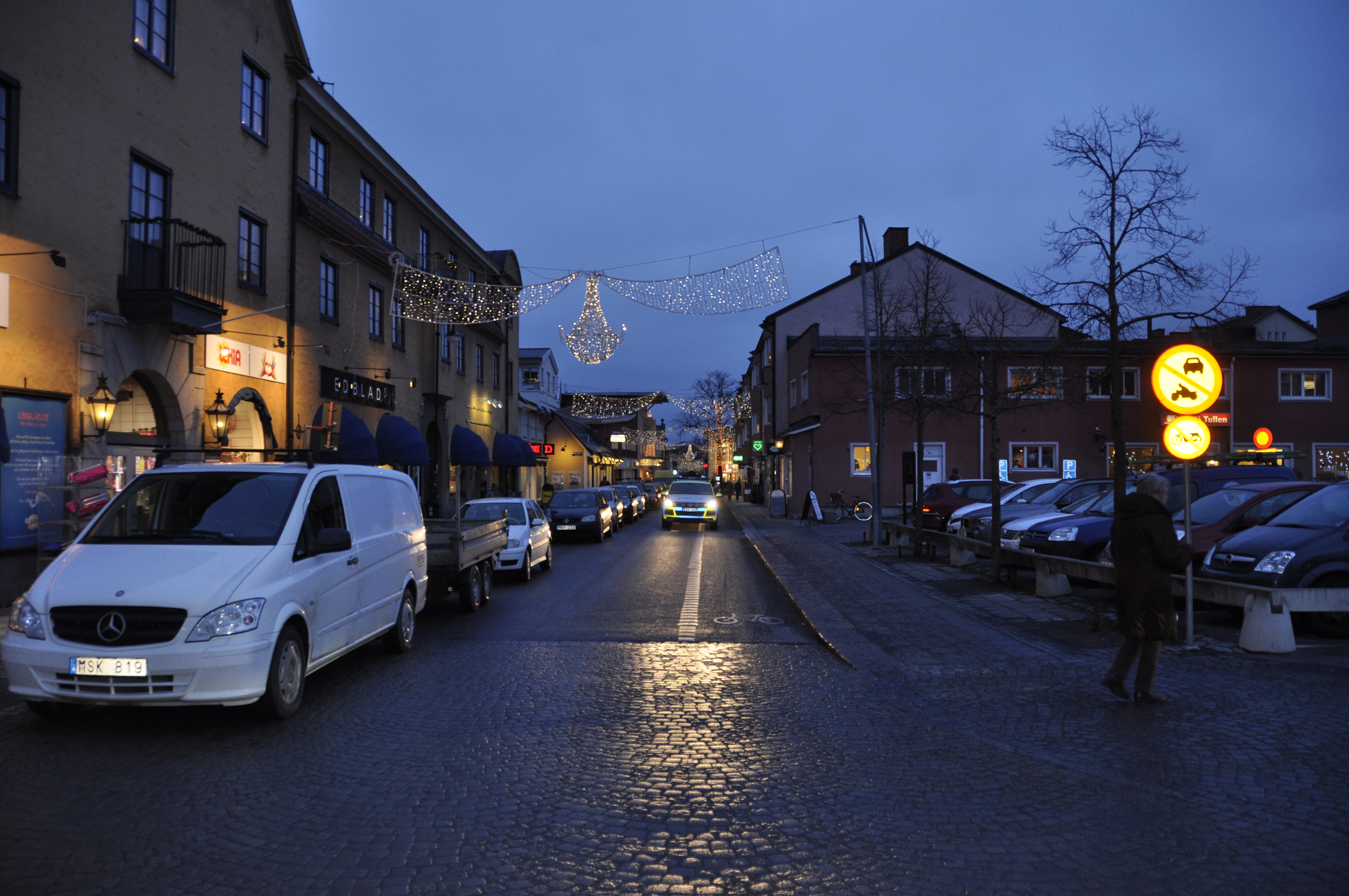 Tullportsgatan i Norrtälje januari 2015